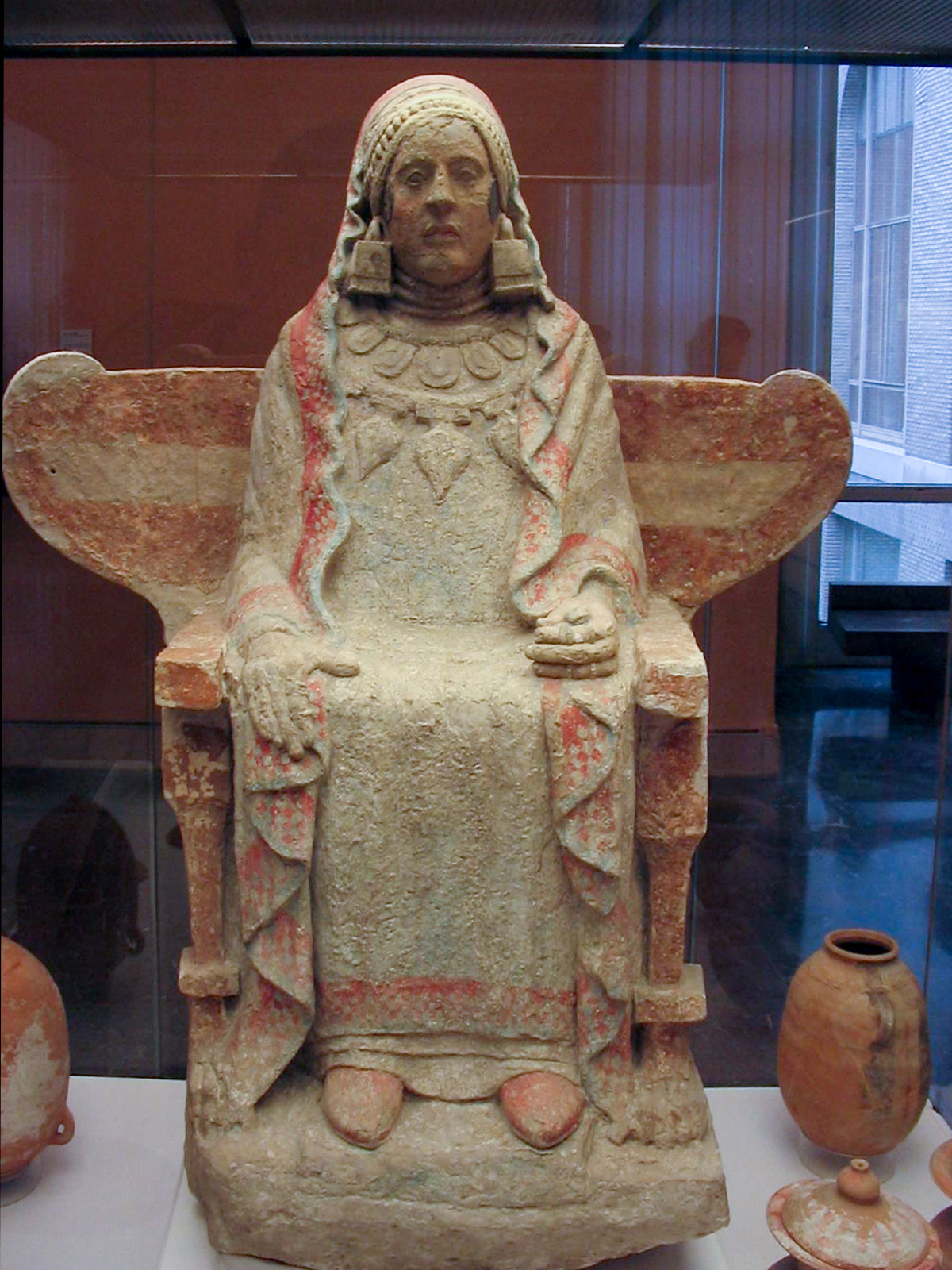 Iberian sculpture.